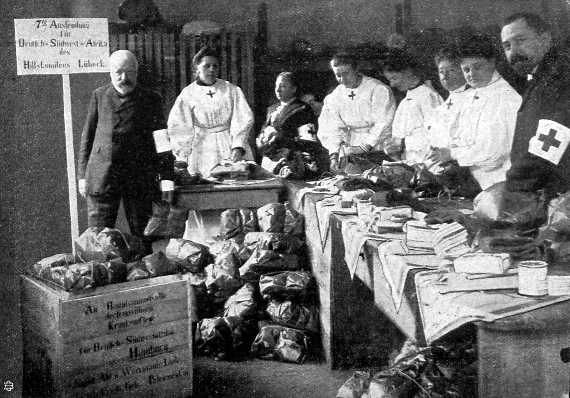 Die Abfertigung einer Sendung Liebesgaben für Deutsch Südwest-Afrika. Auf dem Bilde stehen von Links Heinrich Radbruch, Frau Konsul Gosmann, Frau Oberst Neßler, Frau Senator Wolpmann, Frau Dr. Wichmann